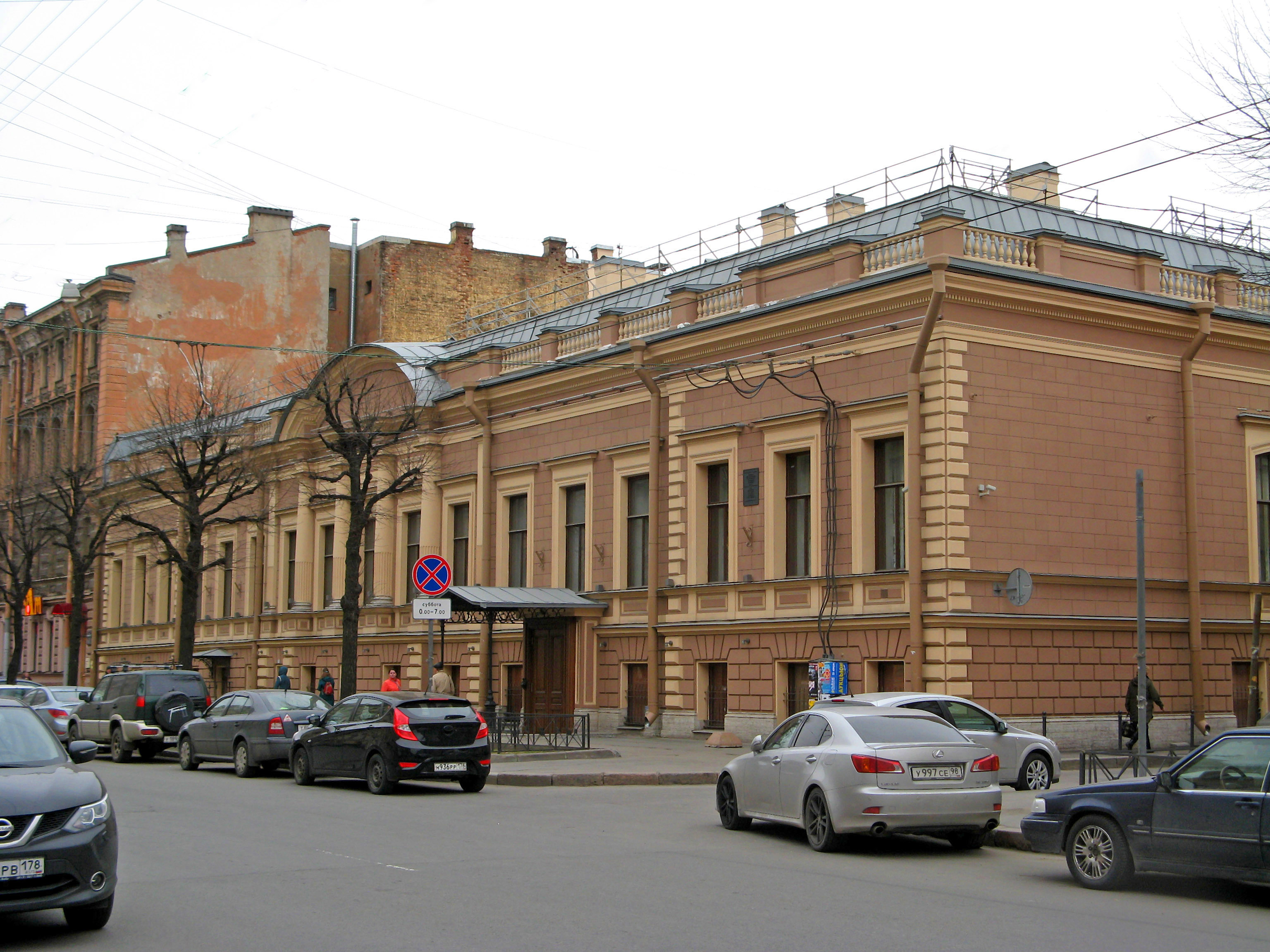 Особняк Трубецкого П.Н. (Нарышкиных) с дворовыми флигелями: улица Чайковского, 29, Друскенинкский переулок, 2, Центральный район, Санкт-Петербург